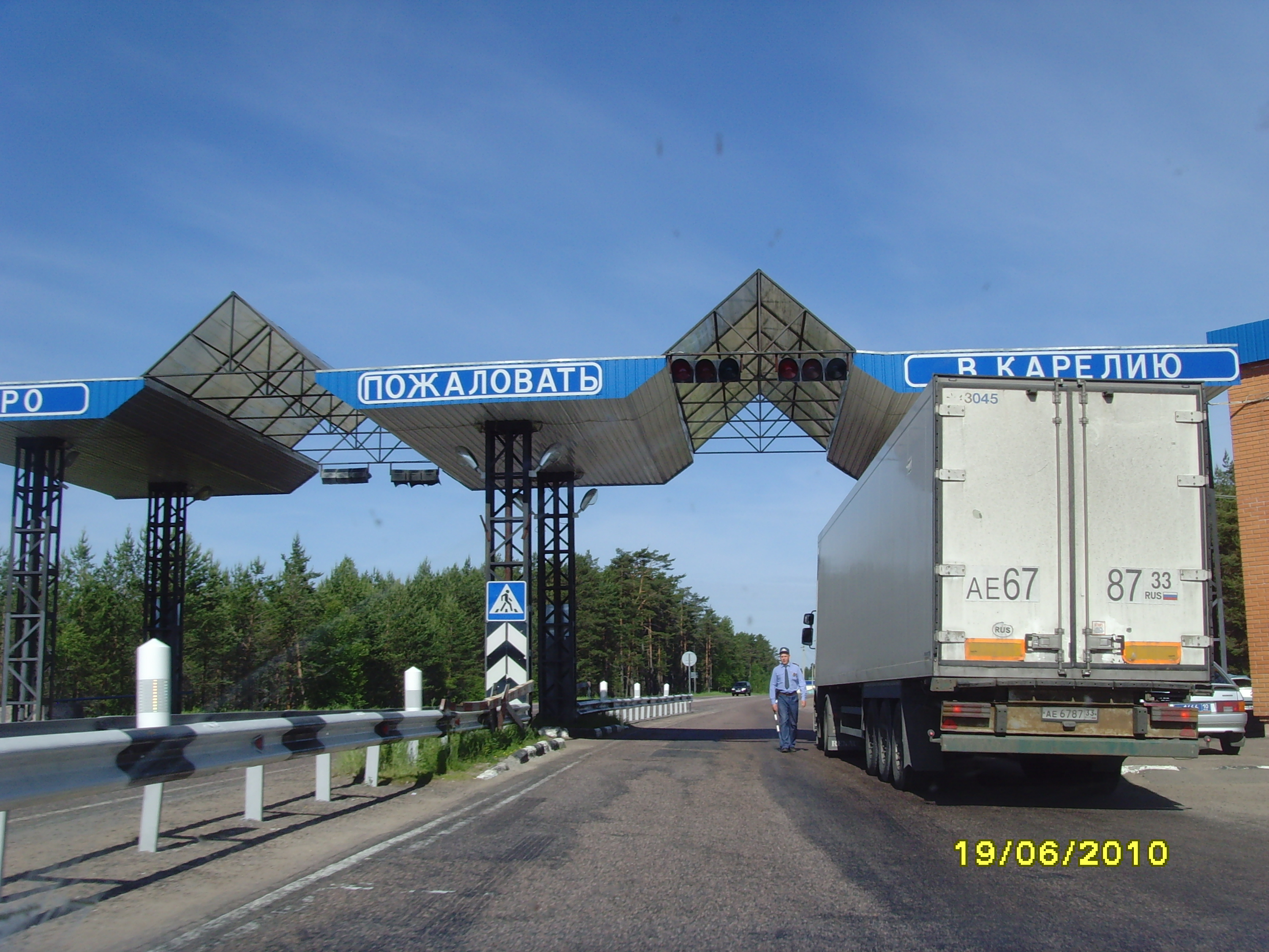 Добро пожаловать в Карелию